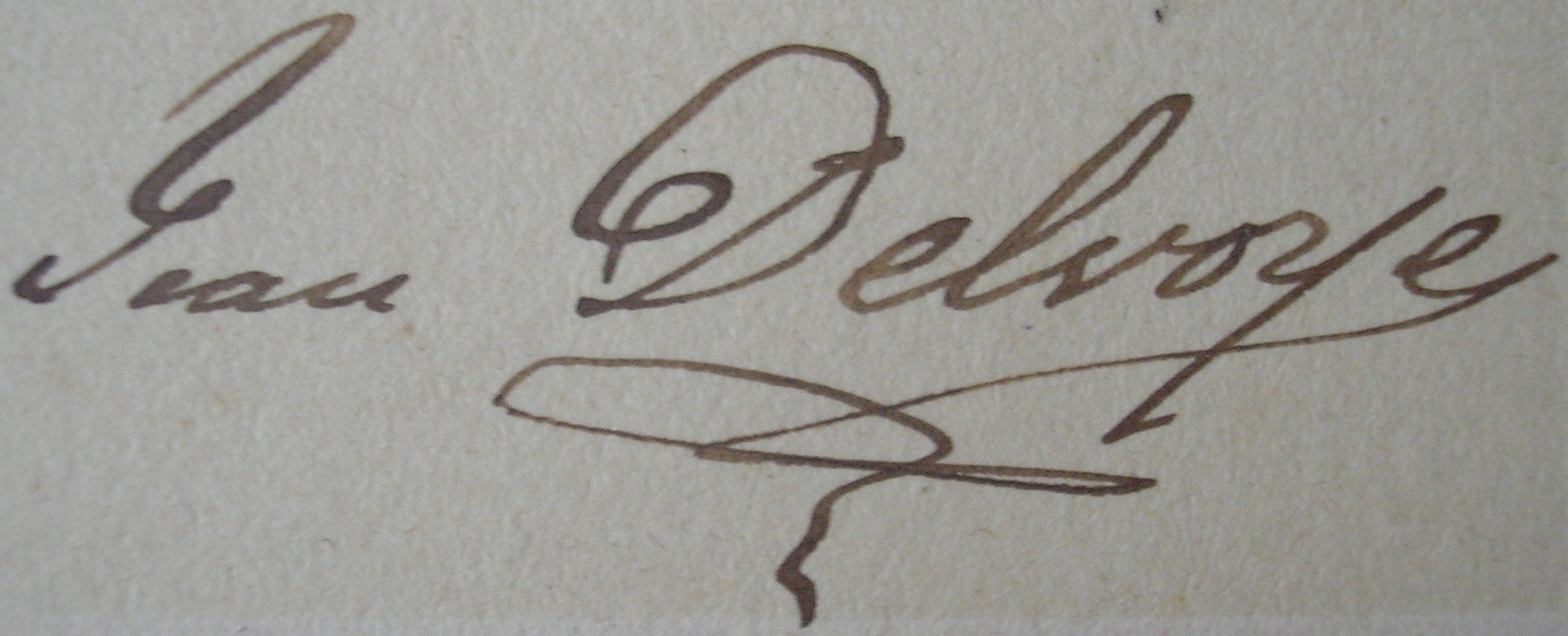 Photographie de Jean Delvoye par Ouvière, photographe marseillais du XIXe siècle, dédicacée à Ismaël. Deux extraits, photo plein cadre et signature